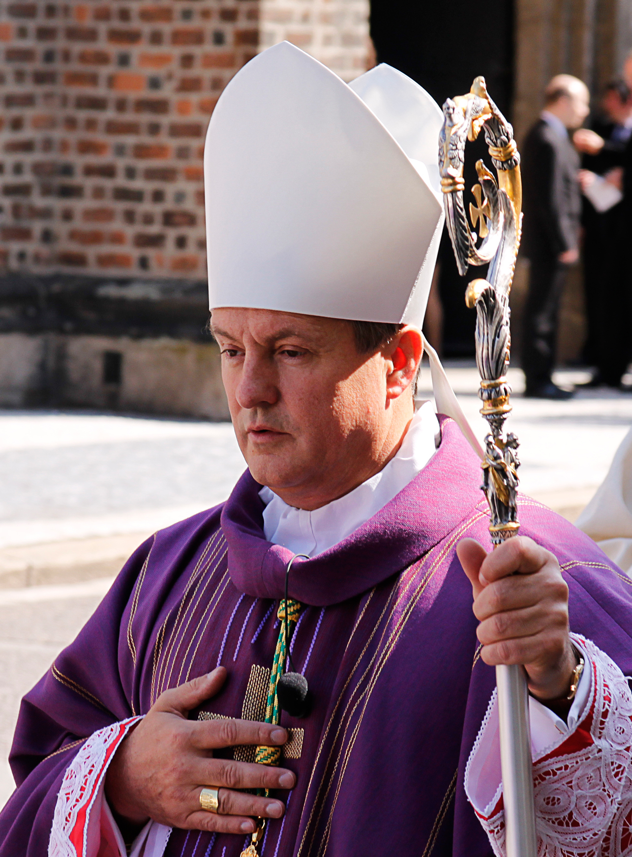 Mons. Jan Vokál na pohřbu Karla Otčenáška.